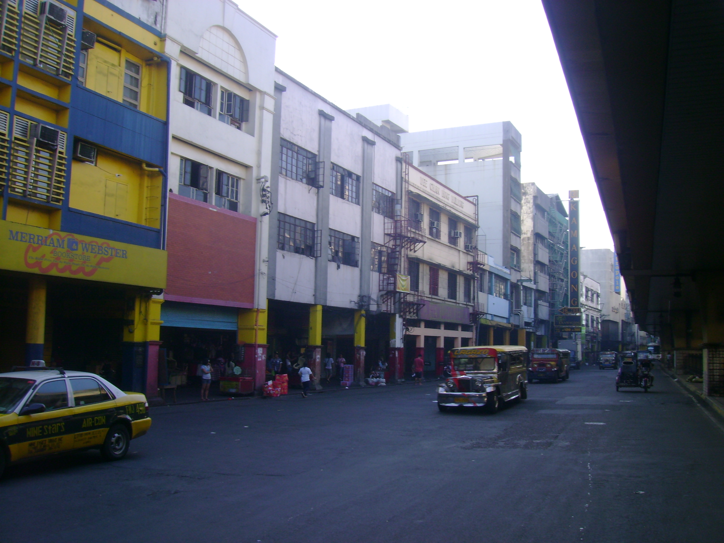 Rizal Avenue in Santa cruz Manila, near Recto Avenue